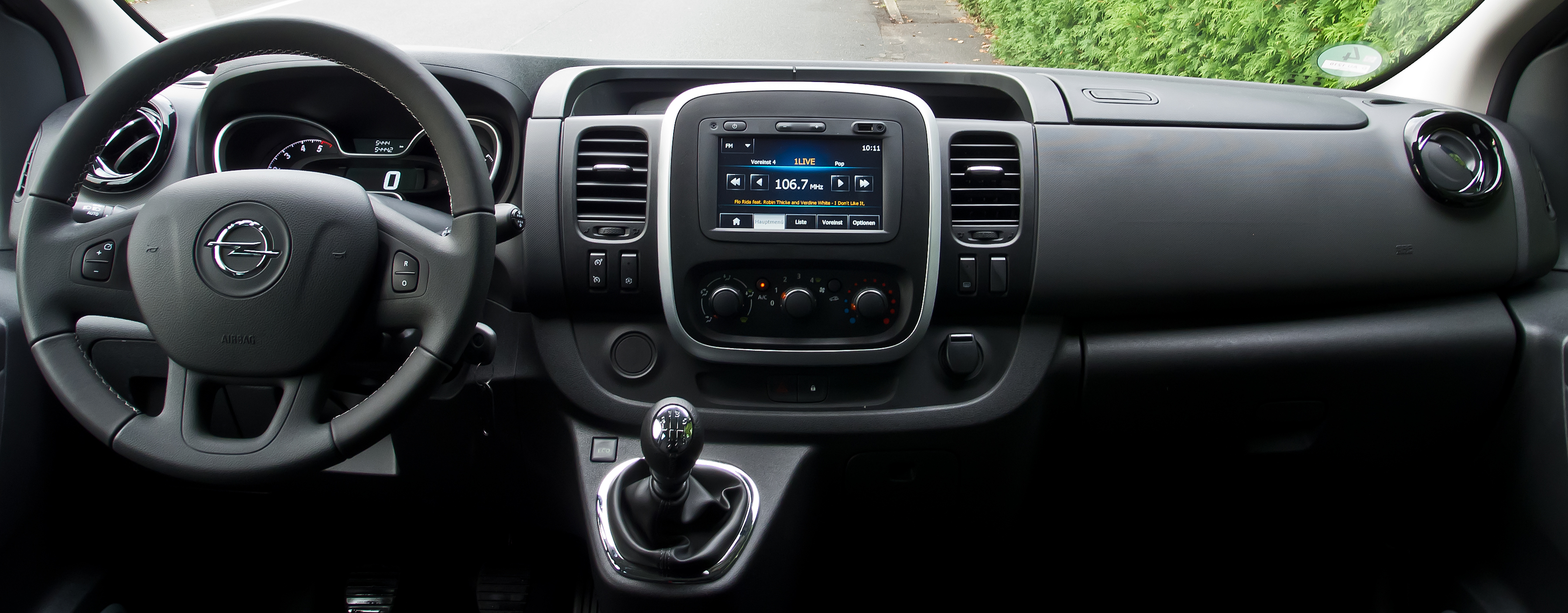 Opel Vivaro Combi 1.6 BiTurbo CDTI ecoFLEX (B)